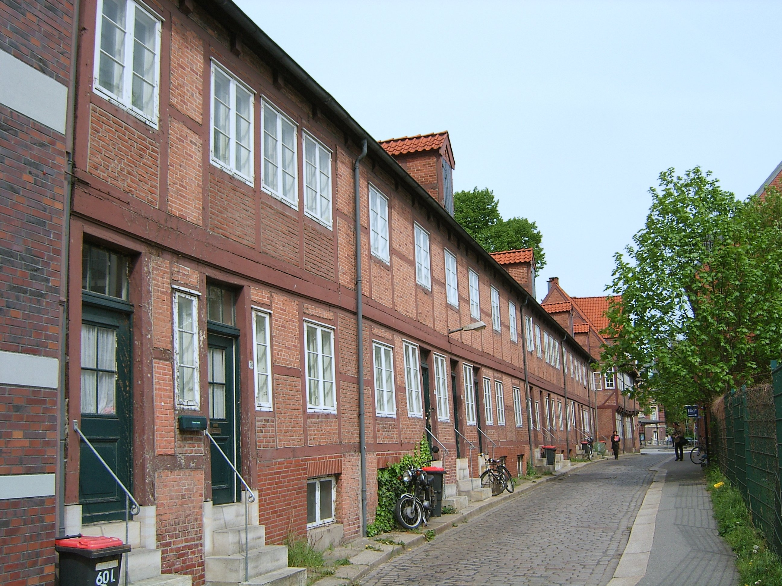 Der Bäckerbreitergang in der Hamburger Neustadt, ein Überbleibsel des Gängeviertels. This is a photograph of an architectural monument.